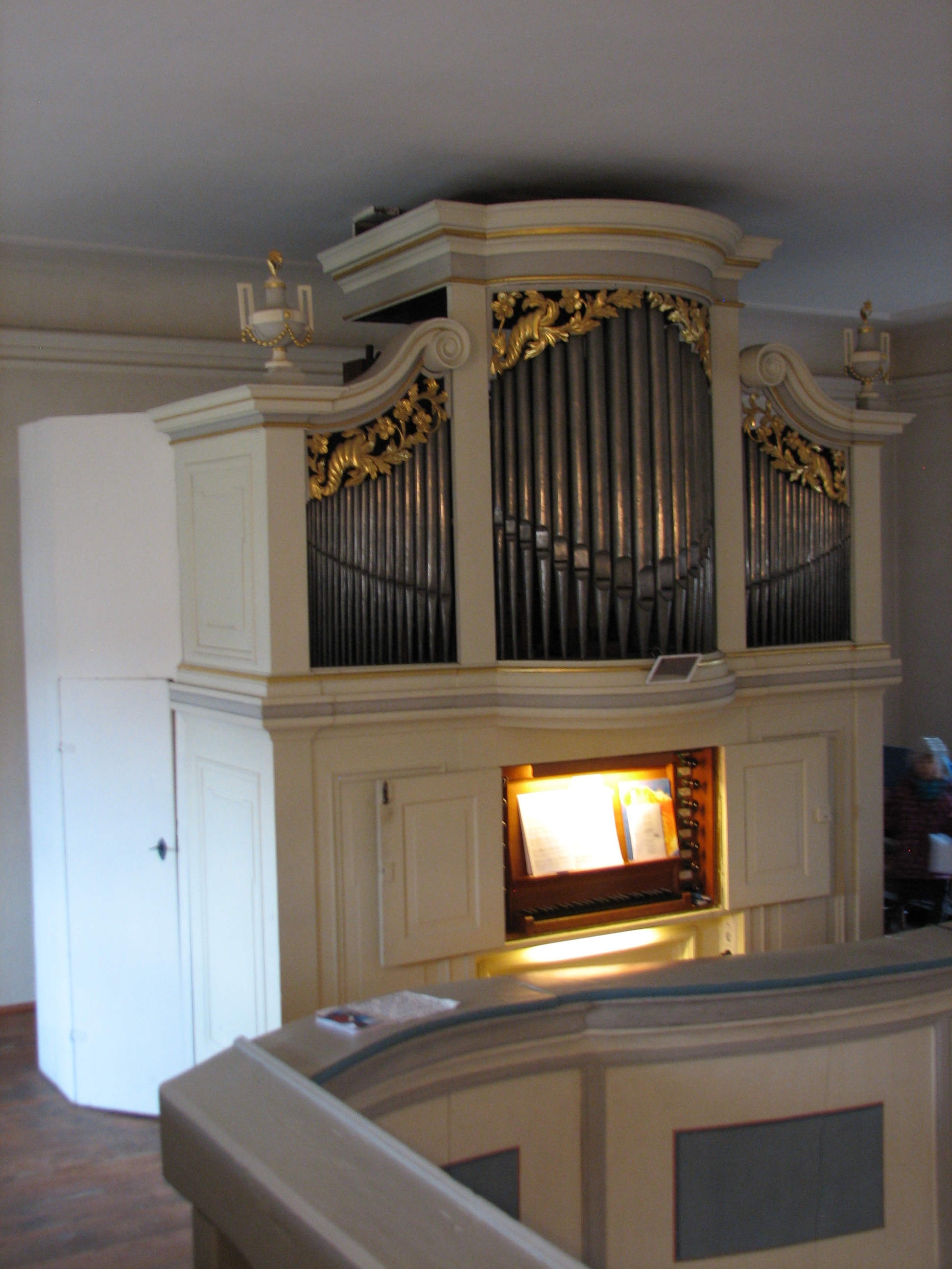 Orgel